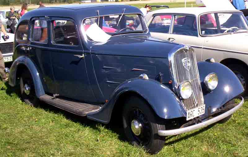 Peugeot 301D 1935